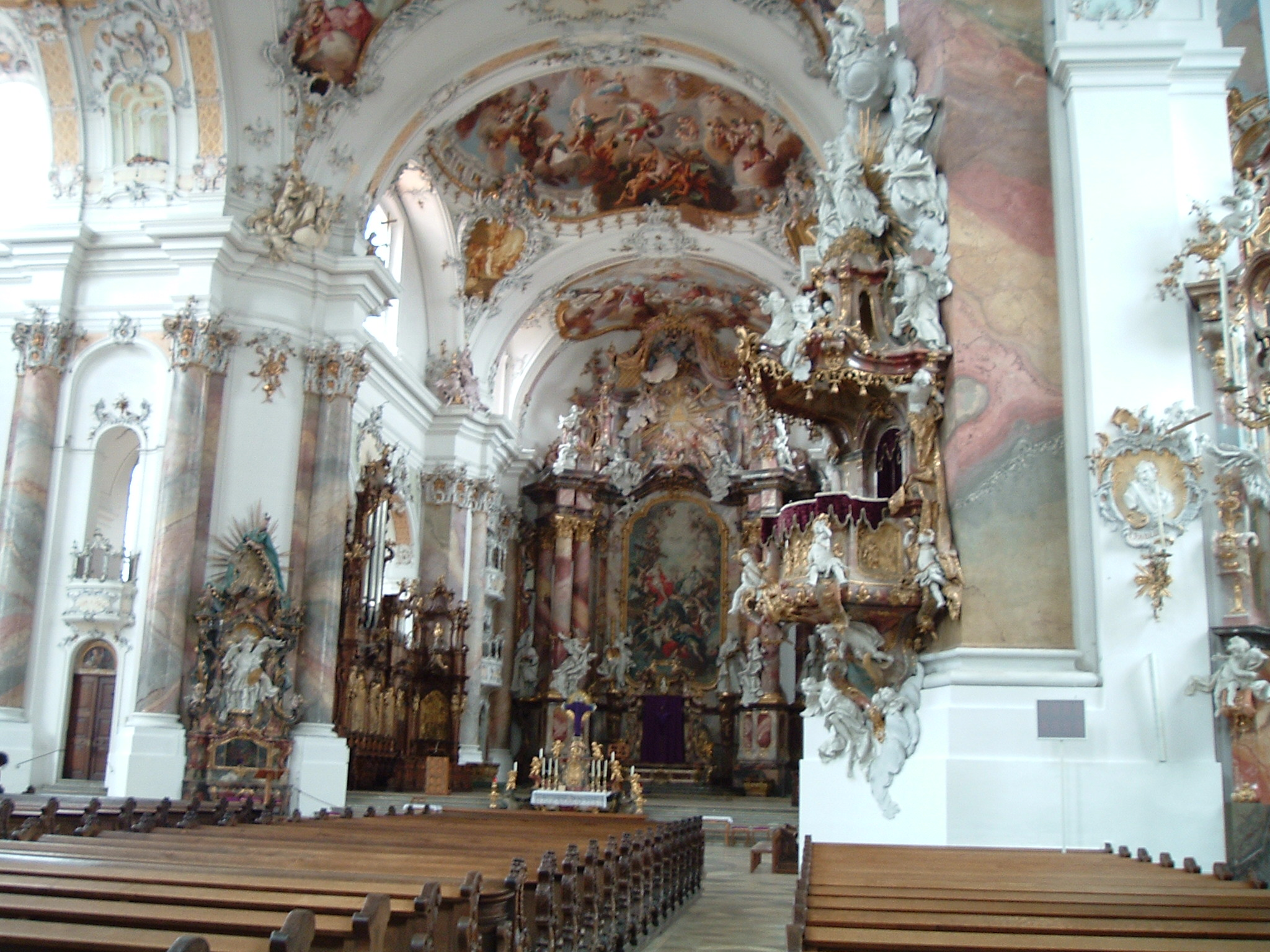 personal picture (April 2004)